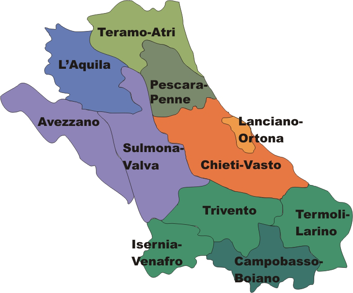 Mapa de la regió eclesiàstica dels Abruços